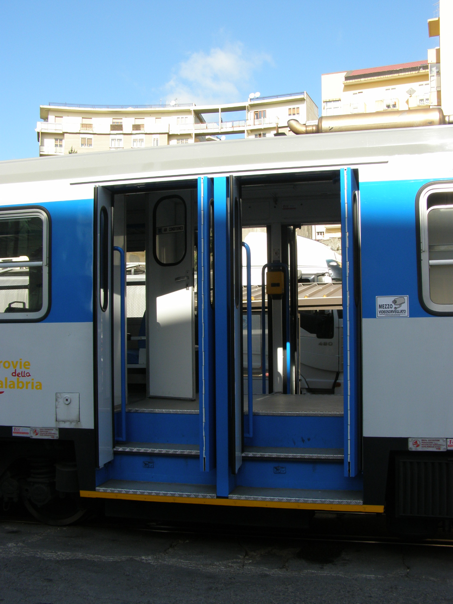 Vestibolo Automotrice M4c.353 nel deposito di Catanzaro Città